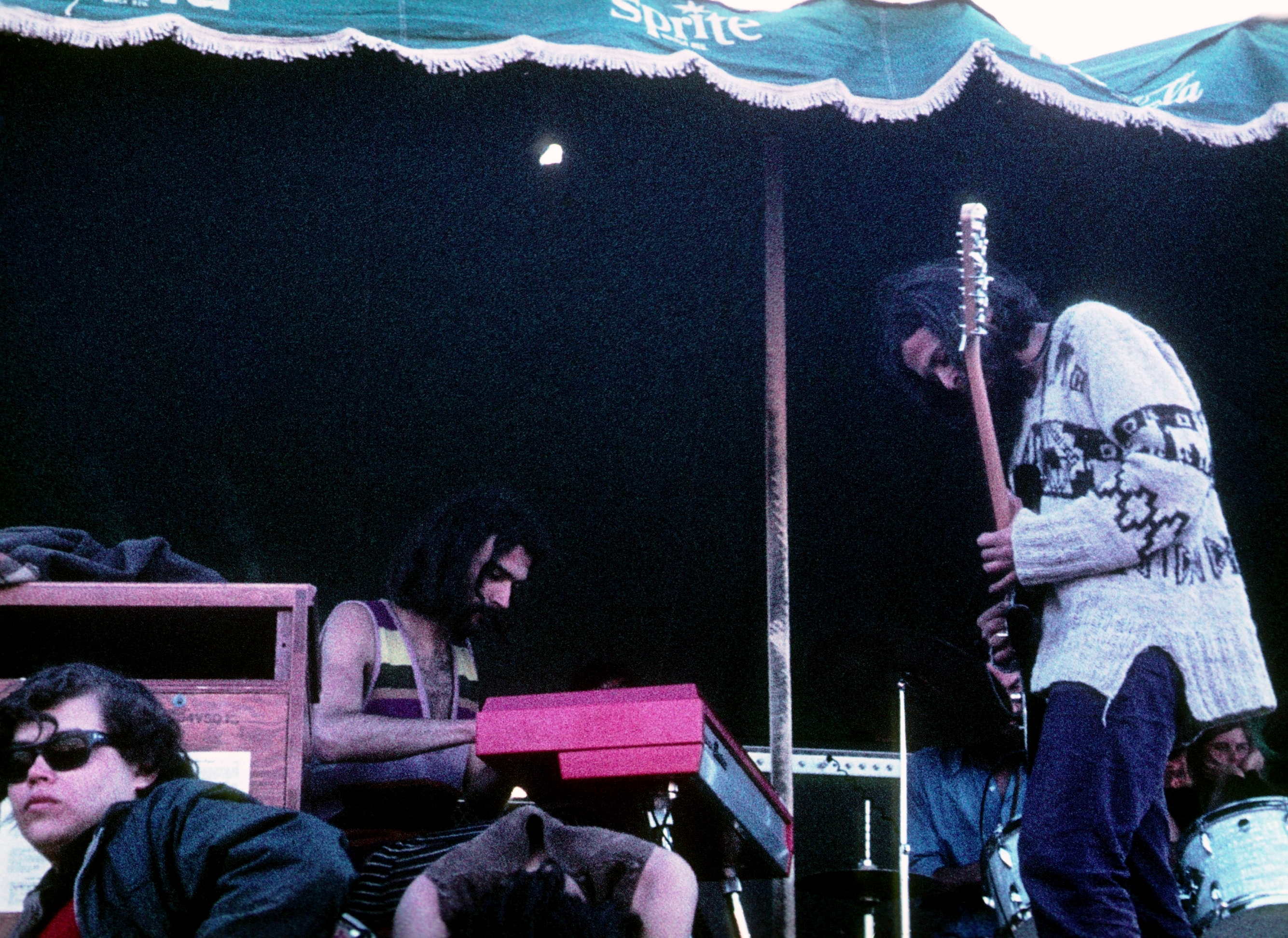 Eduardo Parra (izquierda) y Eduardo "Gato" Alquinta de Los Jaivas, en el Festival de Piedra Roja (octubre 1970). Los Jaivas es una banda chilena, destacada por la combinación del rock progresivo con la zamacueca, junto con la incorporación de instrumentos y ritmos latinoamericanos, especialmente andinos.2 El grupo se formó en 1963 en Viña del Mar, en la costa de la región de Valparaíso, Chile,2 y está actualmente activo. Se les ha considerado a menudo como "una de las bandas más importantes e influyentes de Chile y el resto de Sudamérica".